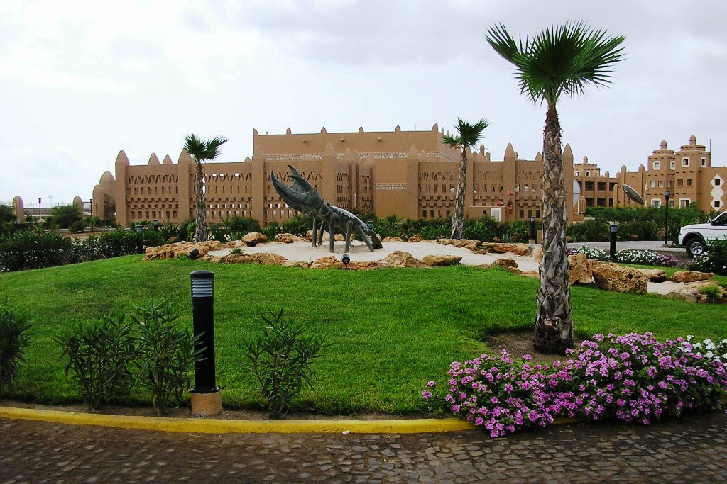 Riu hotel, Sal island, Cape Verde